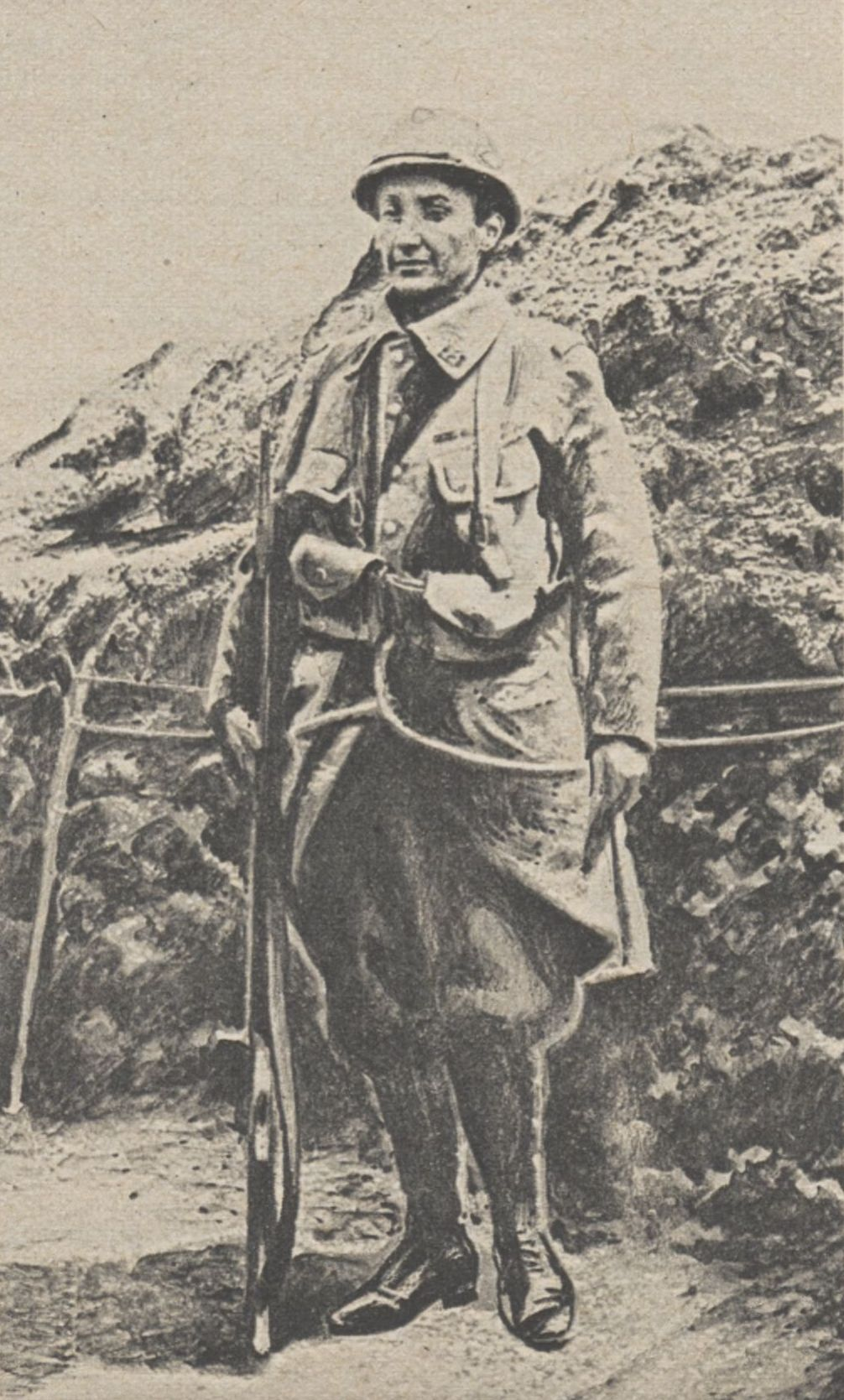 Marie Marvingt dans les tranchées, déguisé en poilu, pendant la Première Guerre mondiale.